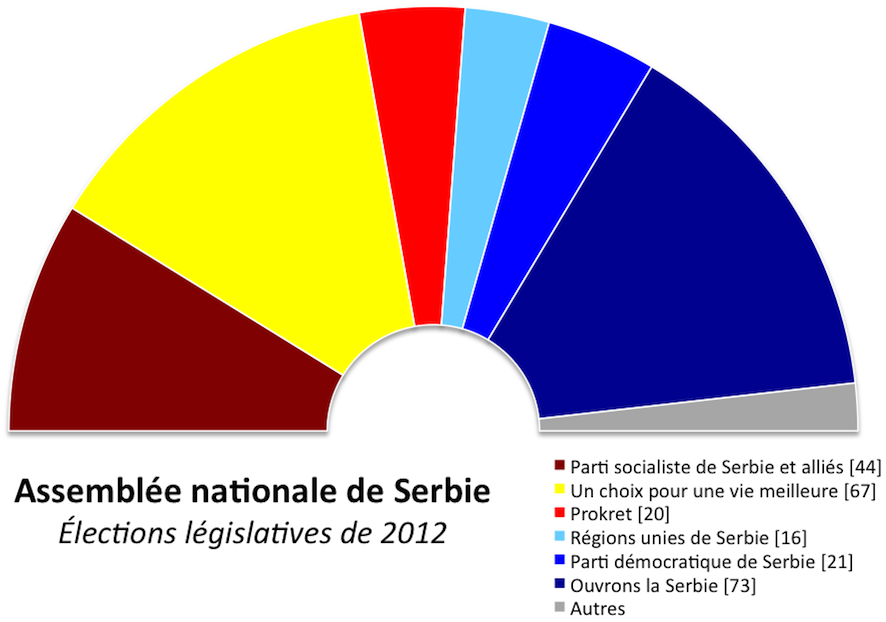 Composition politique de l'Assemblée nationale serbe après les élections législatives du 6 mai 2012.